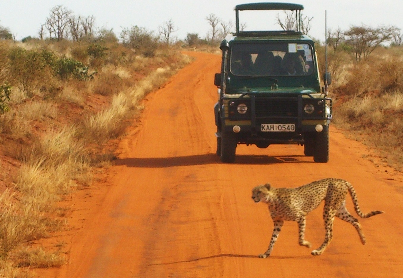 Gepard (Acinonyx jubatus) aufgenommen bei einer Foto-Safari im Tsavo-East-Nationalpark, Kenia